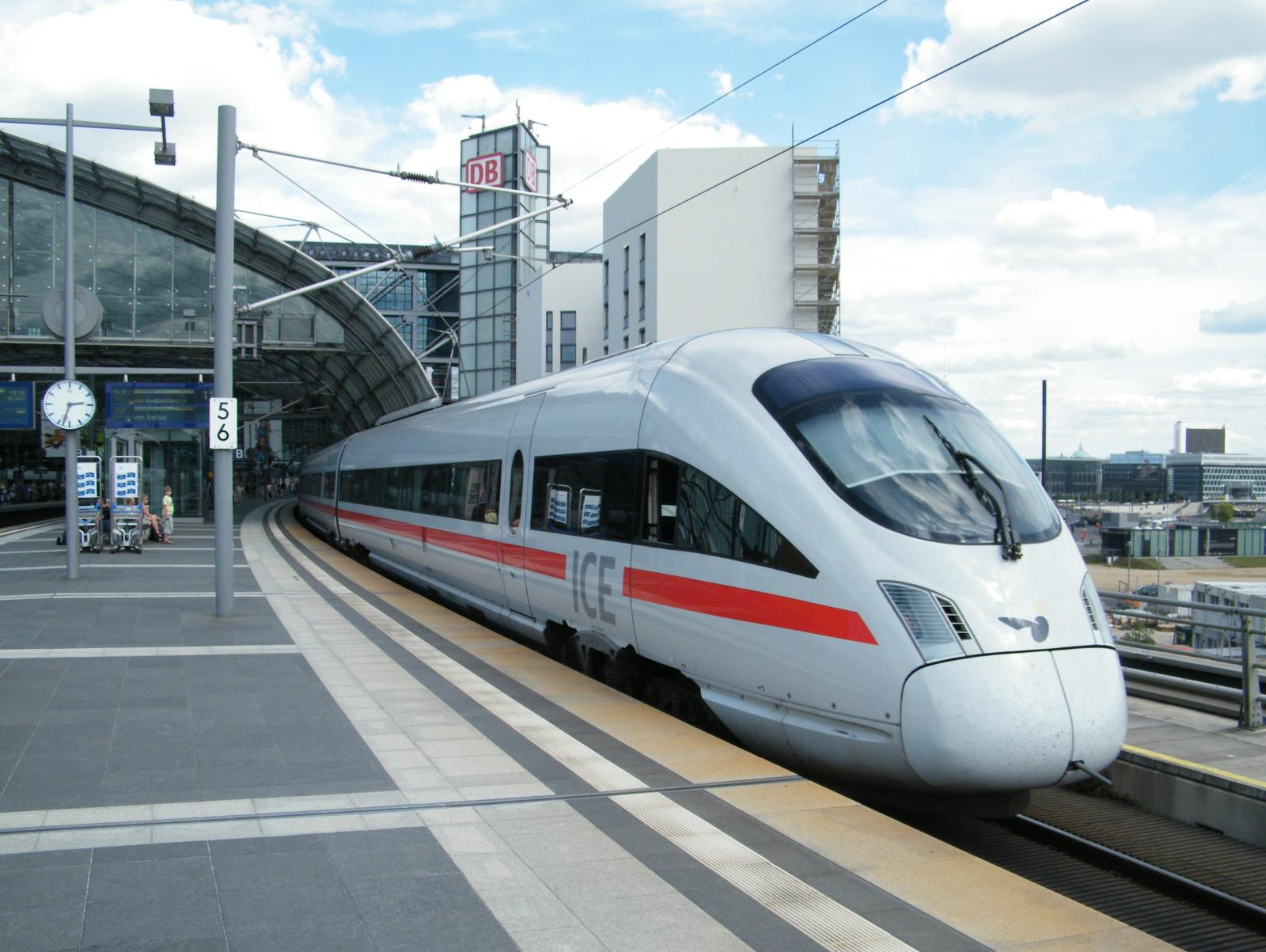 Der ICE 38/381 aus Kopenhagen/Århus (Aarhus) trifft am Berliner Hauptbahnhof ein.